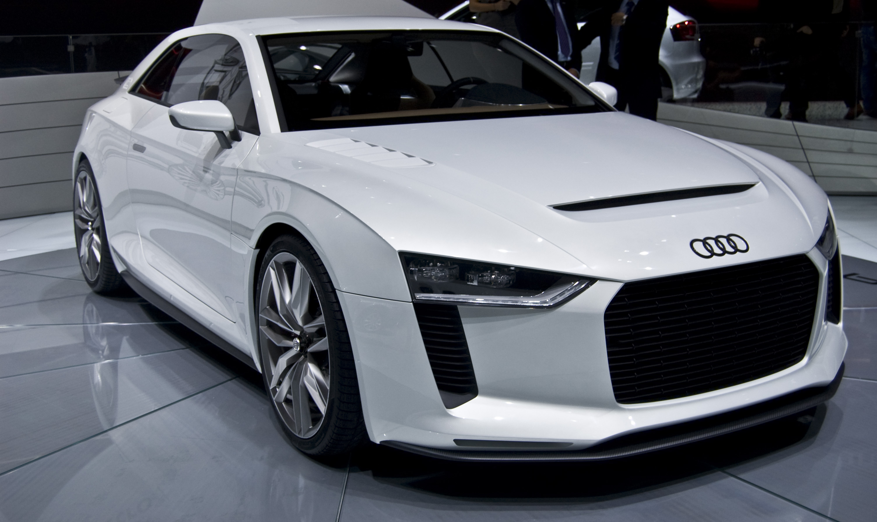 Audi Quattro Concept en el Salón de París 2010